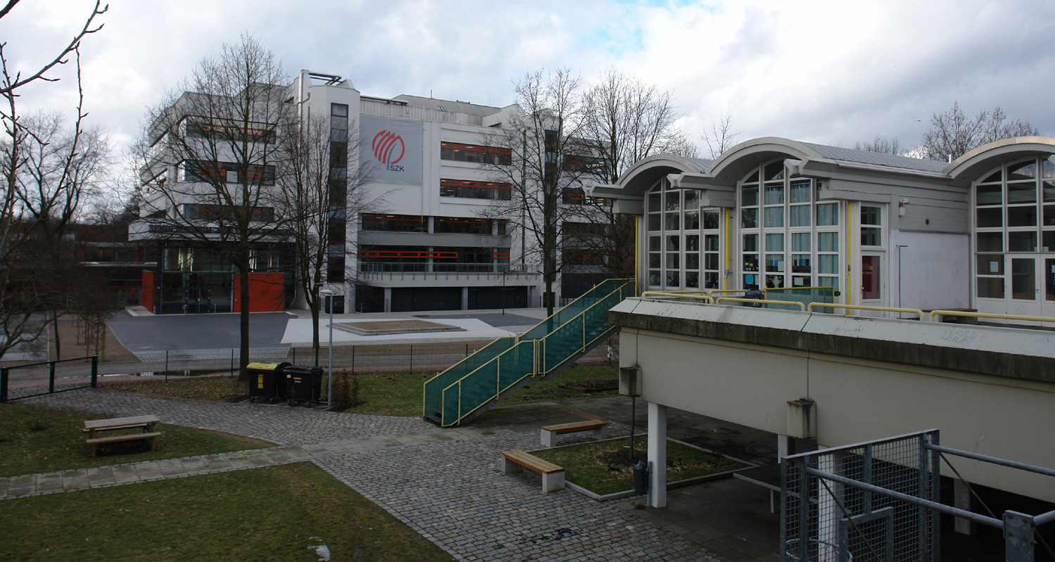 Bremen-Tenever: Schulzentrum Koblenzer Straße, rechts: St. Petri Hort Tenever